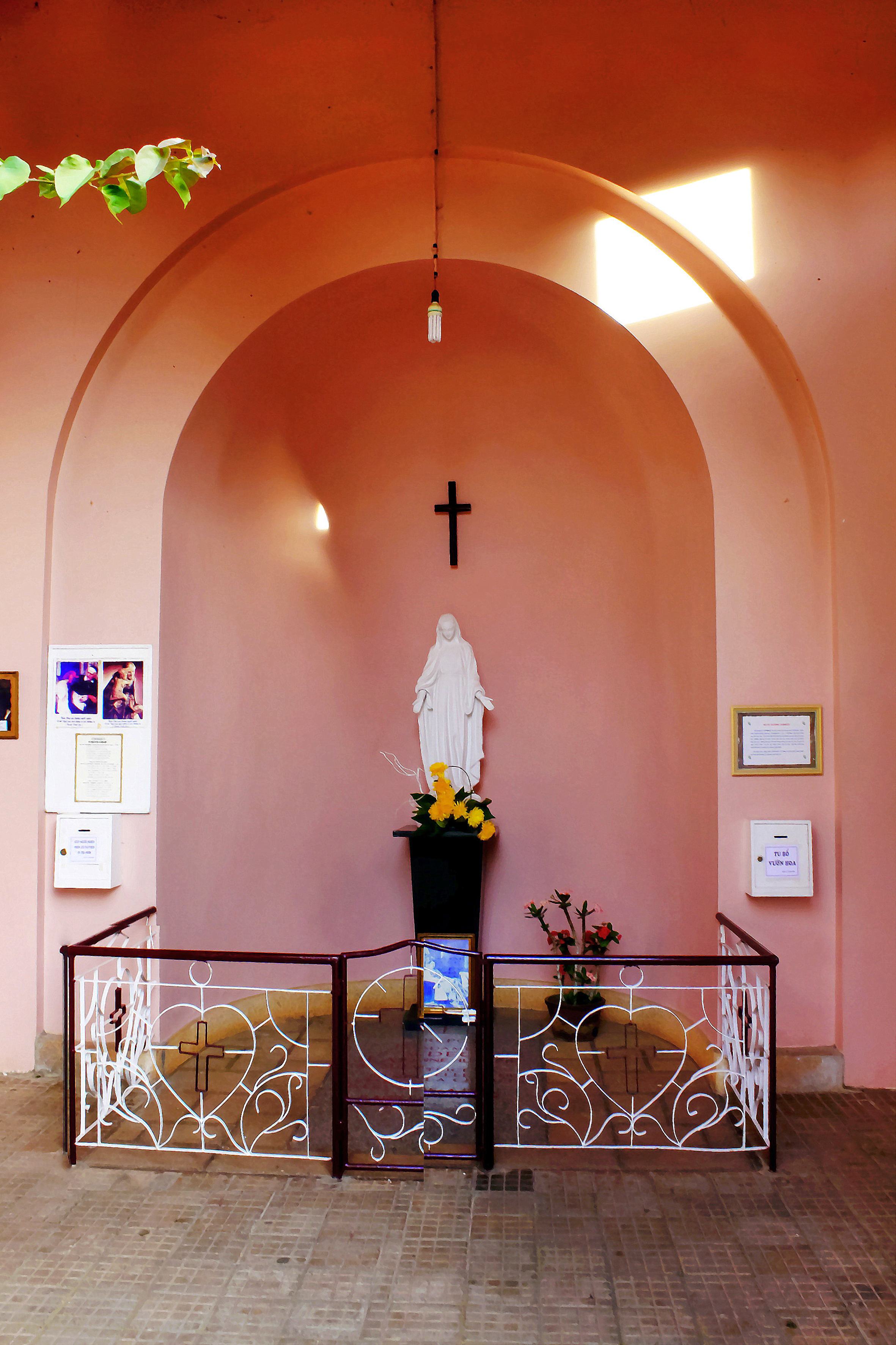 Phần mộ phu nhân Toàn quyền Đông Dương Decoux trong khuôn viên nhà thờ Domaine de Marie ở TP Đà Lạt (Việt Nam).